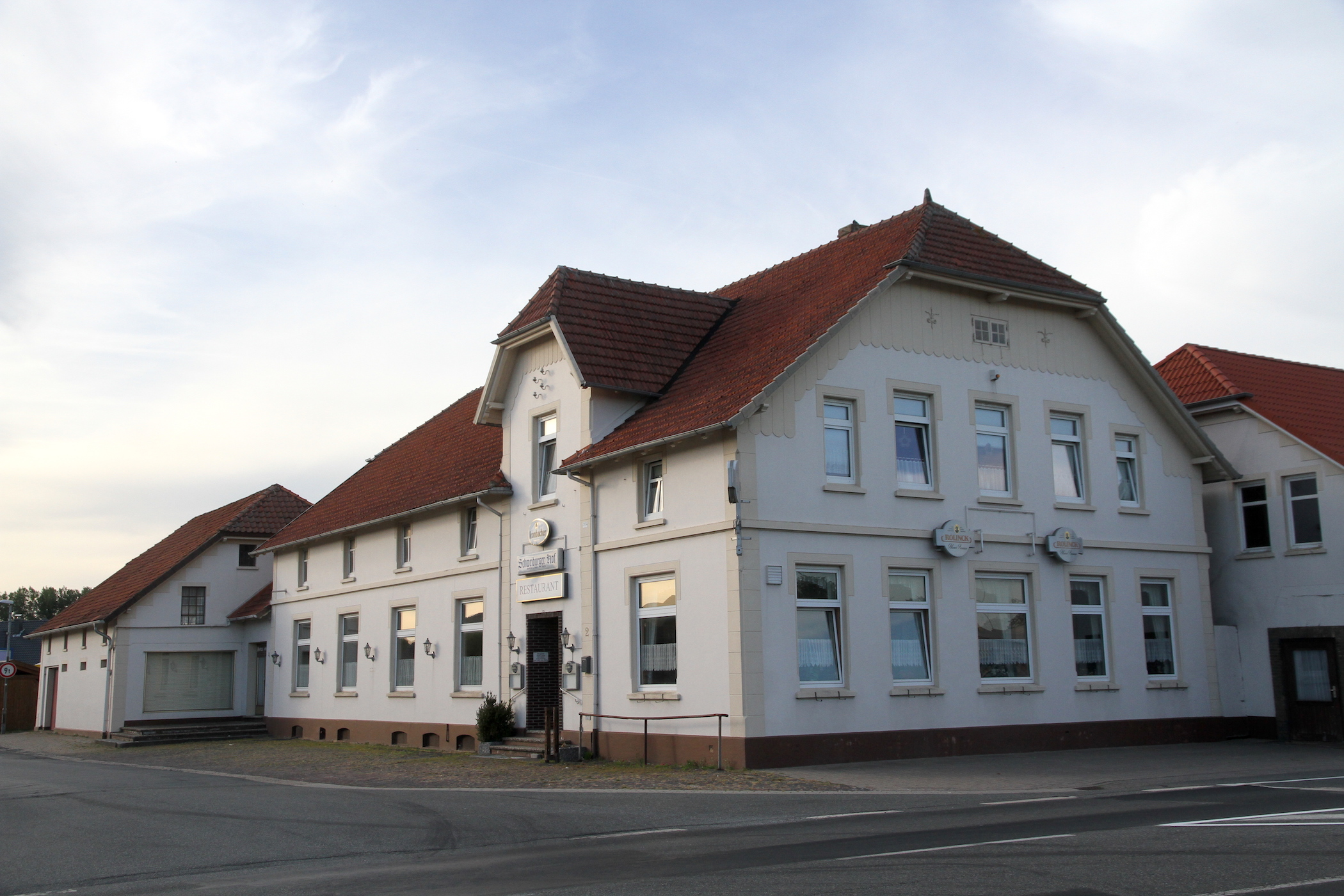 Das Gebäude des ehemaligen Schweiburger Hofes. Eine Restauration besteht dort derzeit (2018) nicht mehr. Im linken Teil befand sich ein Kaufmannsladen (bis Mitte der 1990er Jahre), im rechten Teil ein Saal, der zum Schweiburger Hof gehörte.